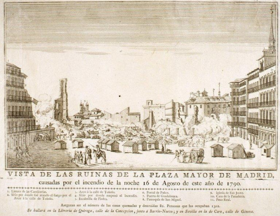 Vista de las ruinas de la Plaza Mayor de Madrid después del incendio de 1790.